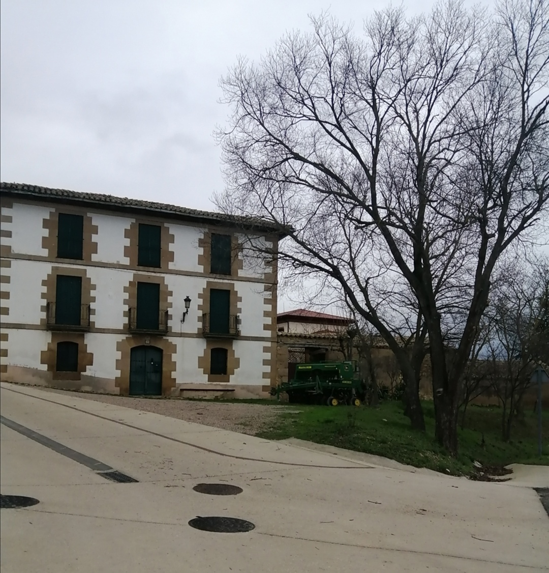 Casa etxeberrias garinoain